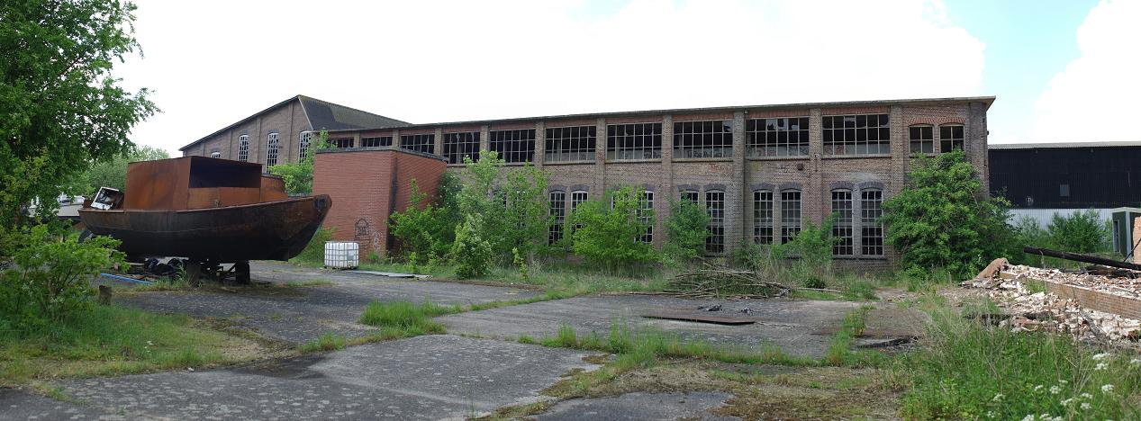 Urban Exploring Aardappelzetmeelfabriek Ter Apel